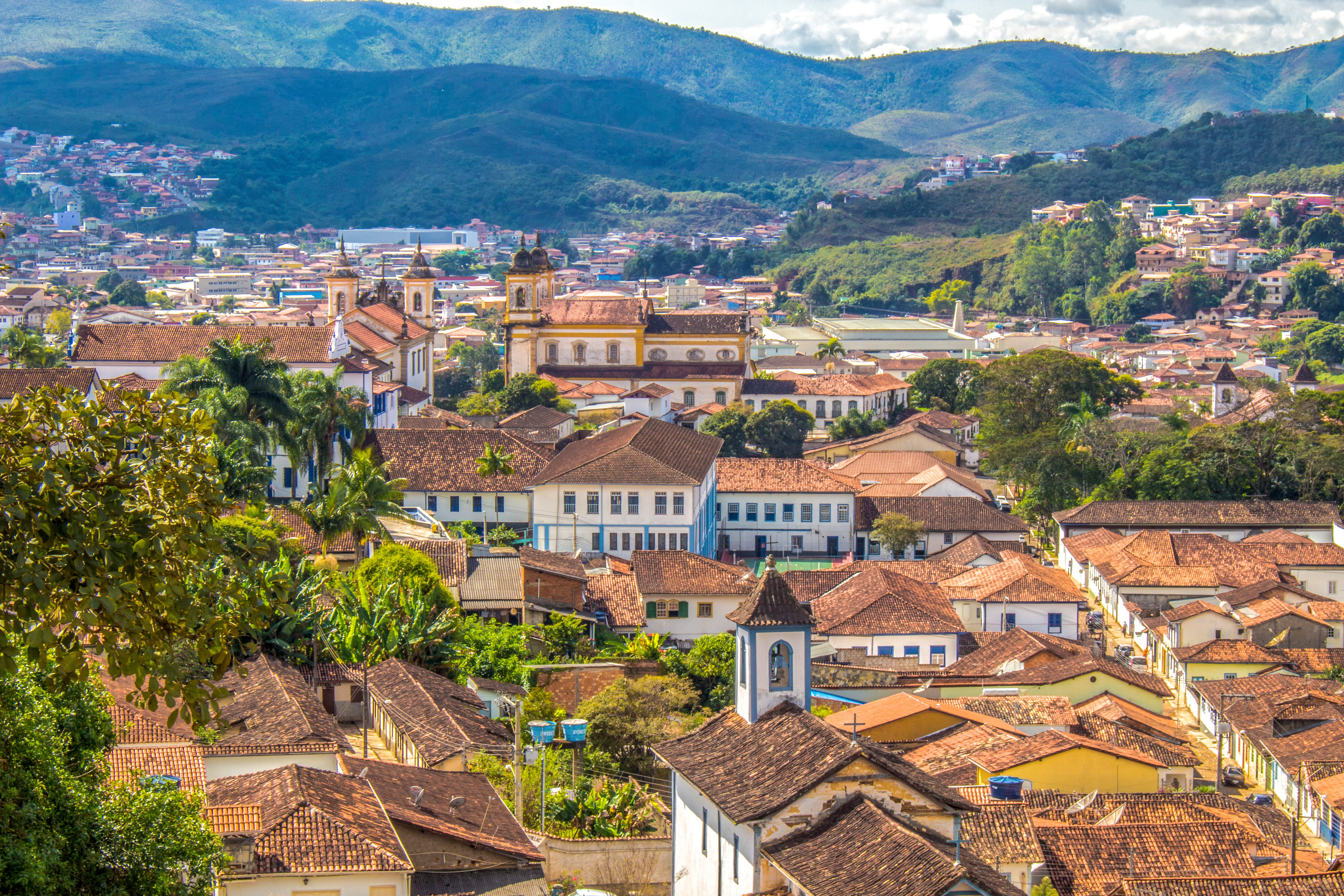 Mariana, MG: conjunto arquitetônico e urbanístico